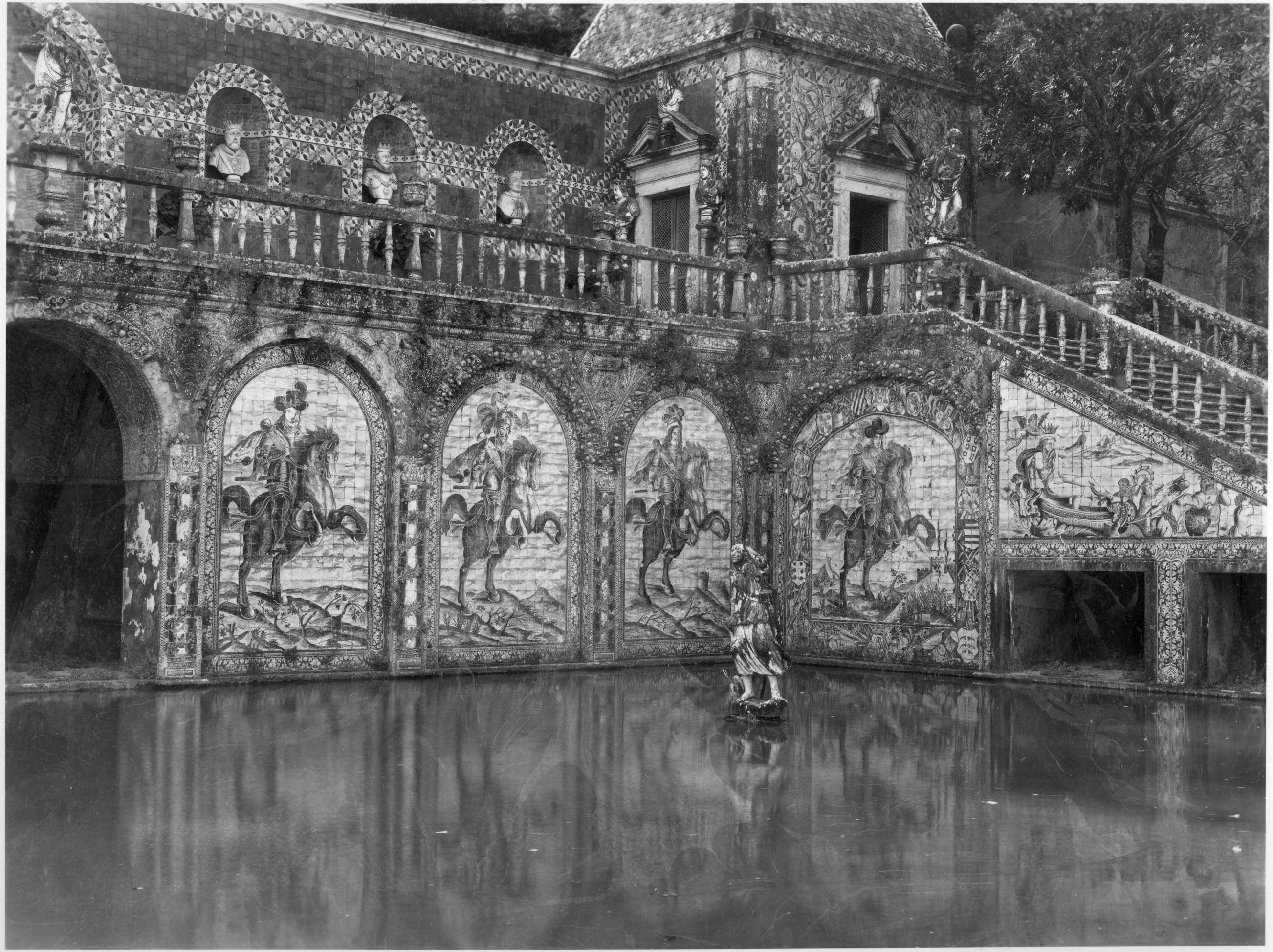 Painel de azulejos da Galeria dos Reis do Palácio dos Marqueses de Fronteira. Azulejos do século 17. Autor: João Miguel dos Santos Simões (1907-1972). Data de produção da fotografia original: 1960-1970. [CFT009.1382.ic]